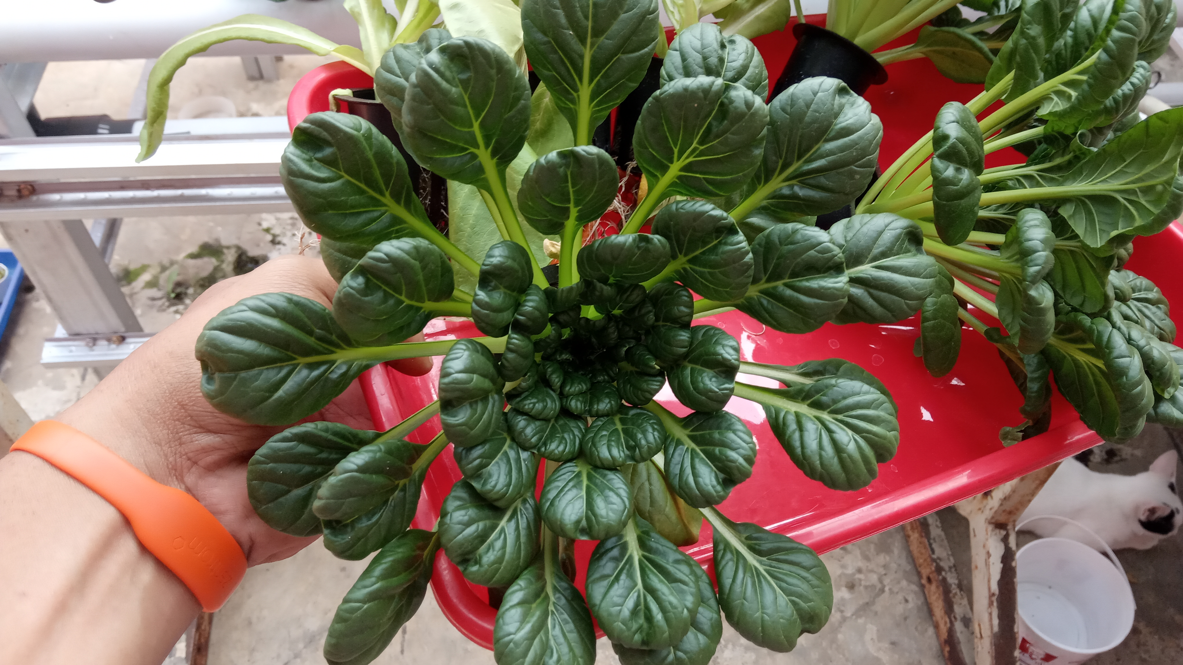 Foto hasil panen Sawi Pagoda ini berumur 30 HST (Hari Setelah Tanam) atau 40 hari HSS (Hari Setelah Semai) menggunakan sistem Hidroponik DFT (Deep Flow Technique) di Purwokerto.